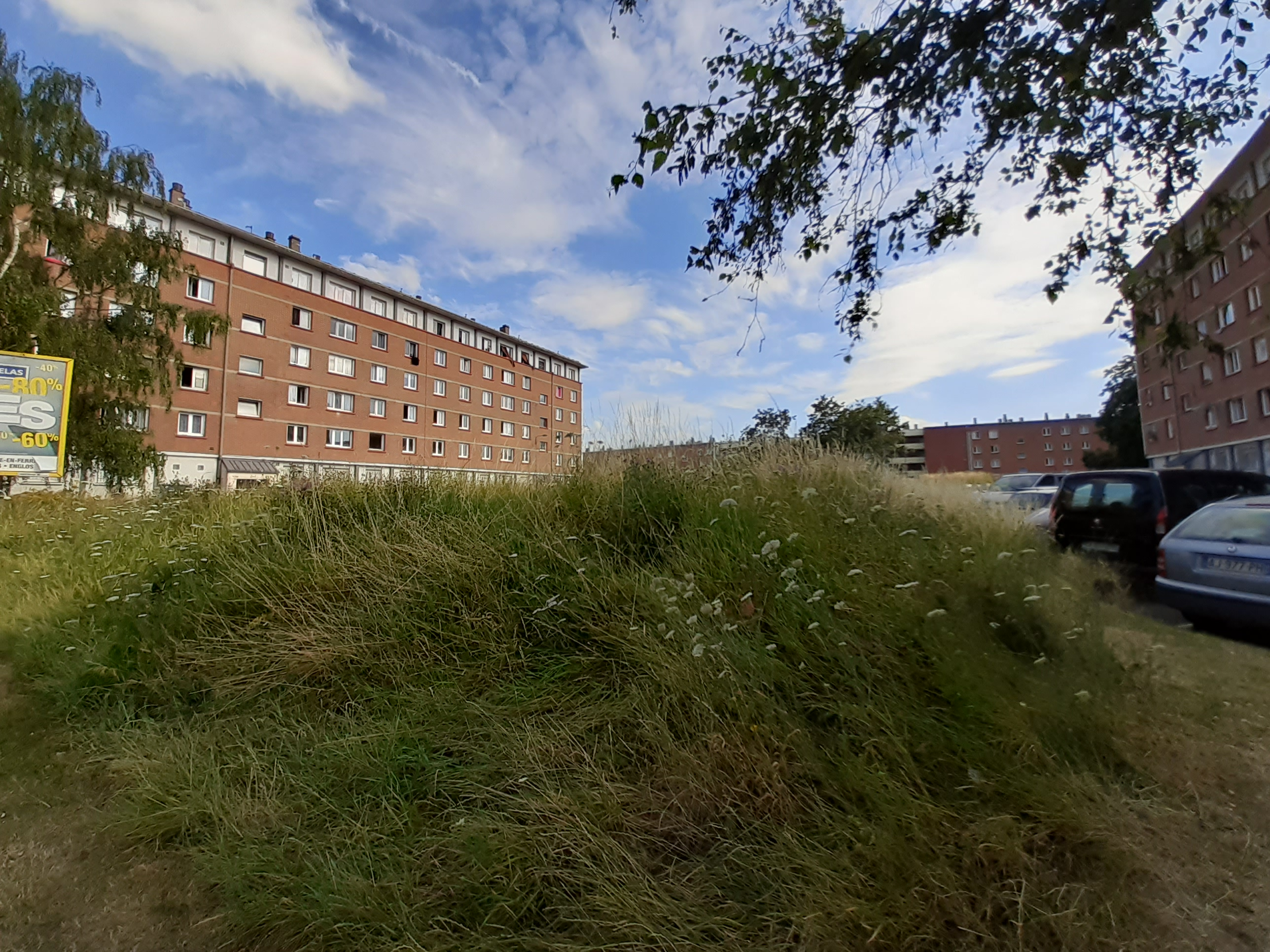 Immeuble FB